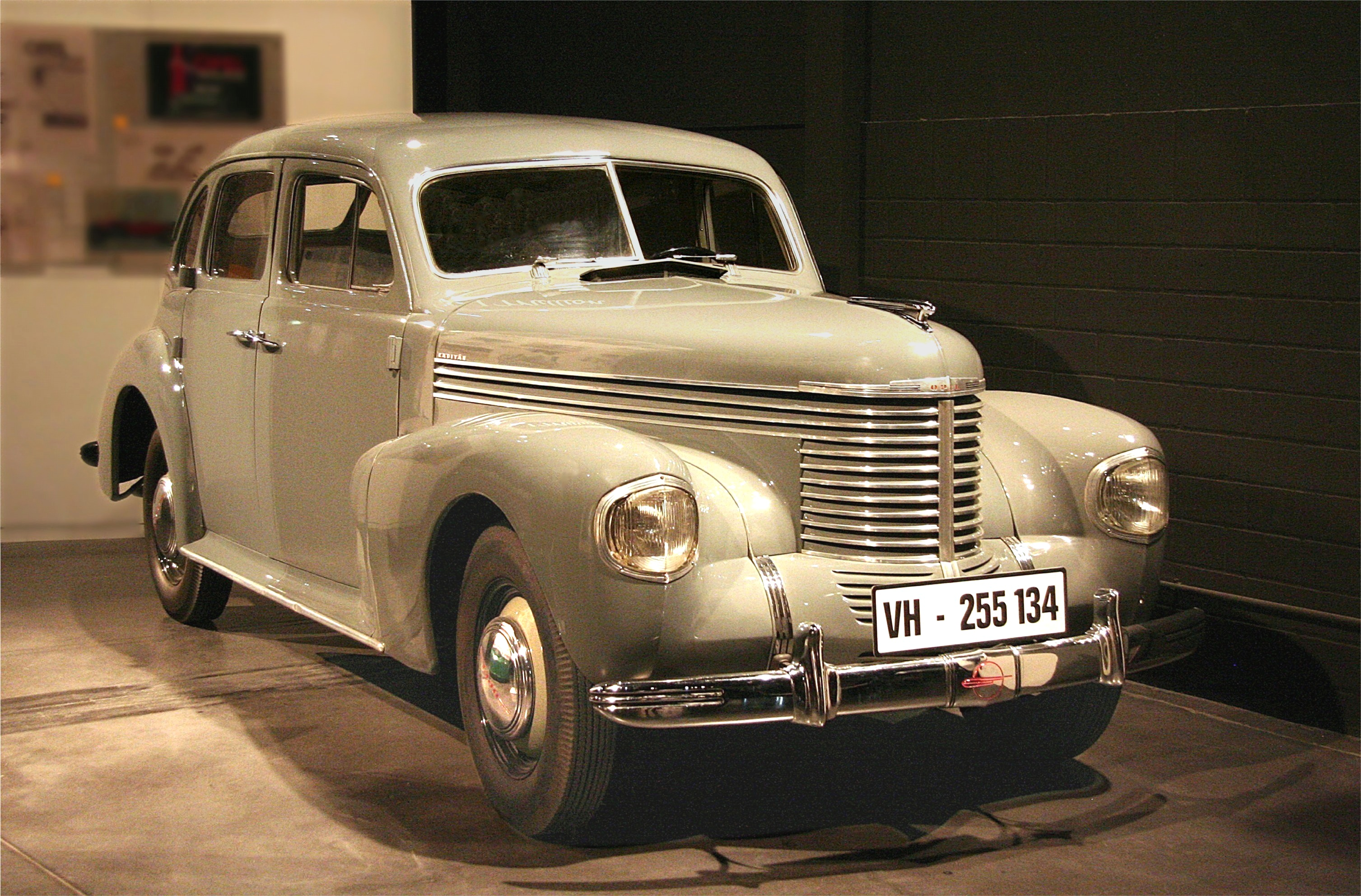 Opel Kapitän (Vorkriegsmodell)